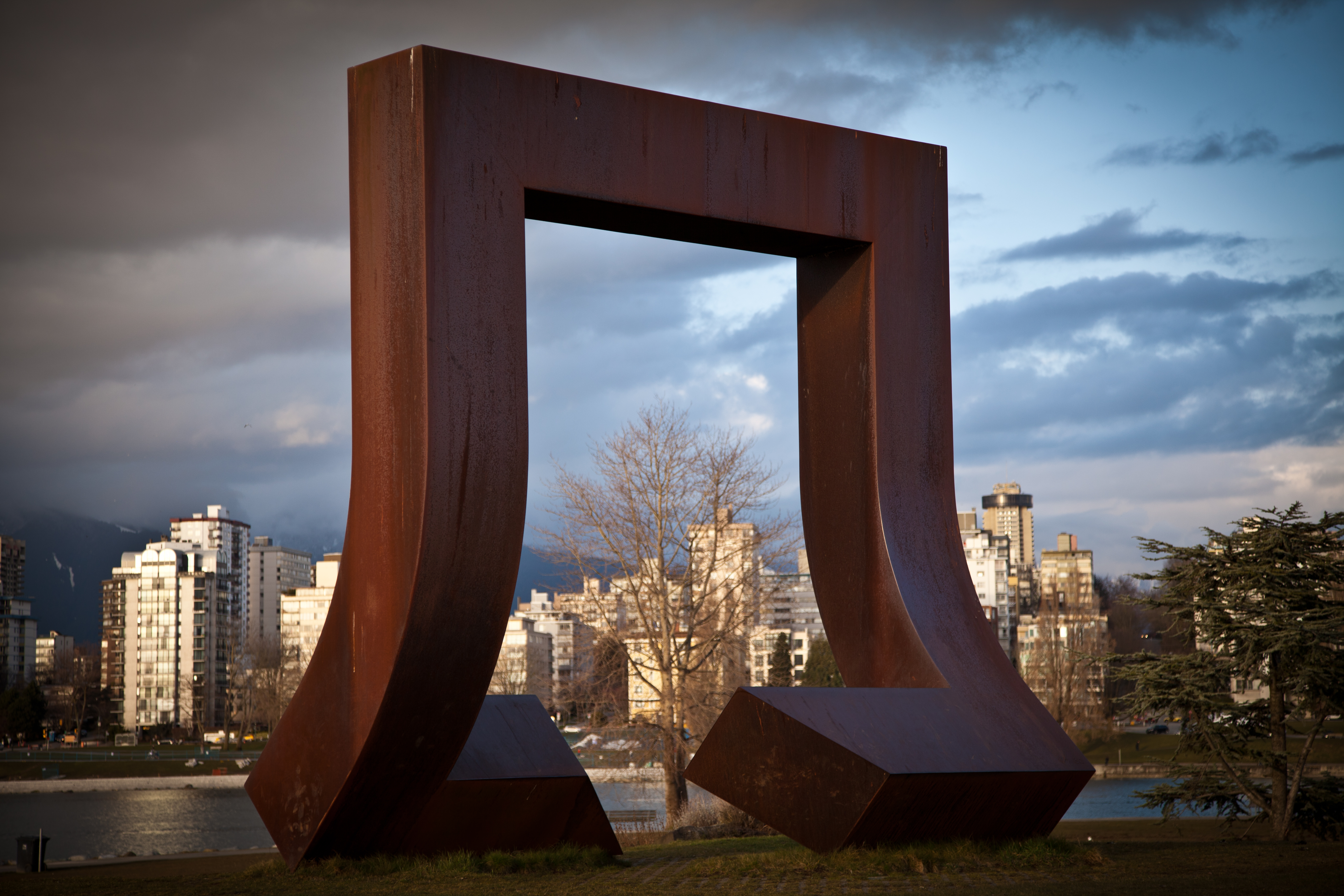 Big Giant Staple